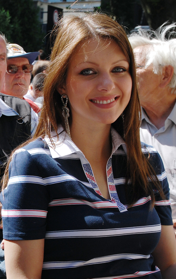 Martina Šindlerová